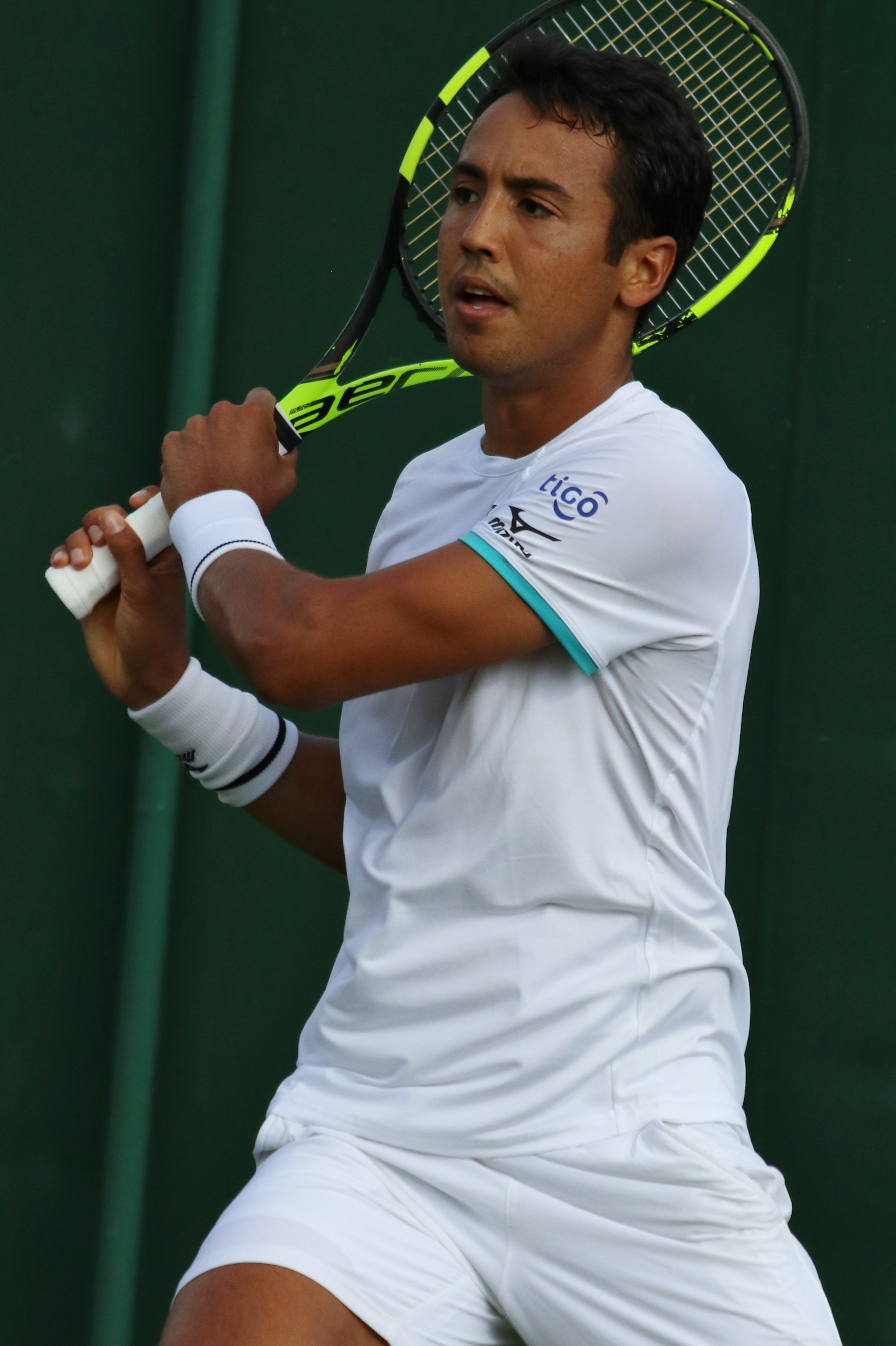 Dellien WM19 (38)